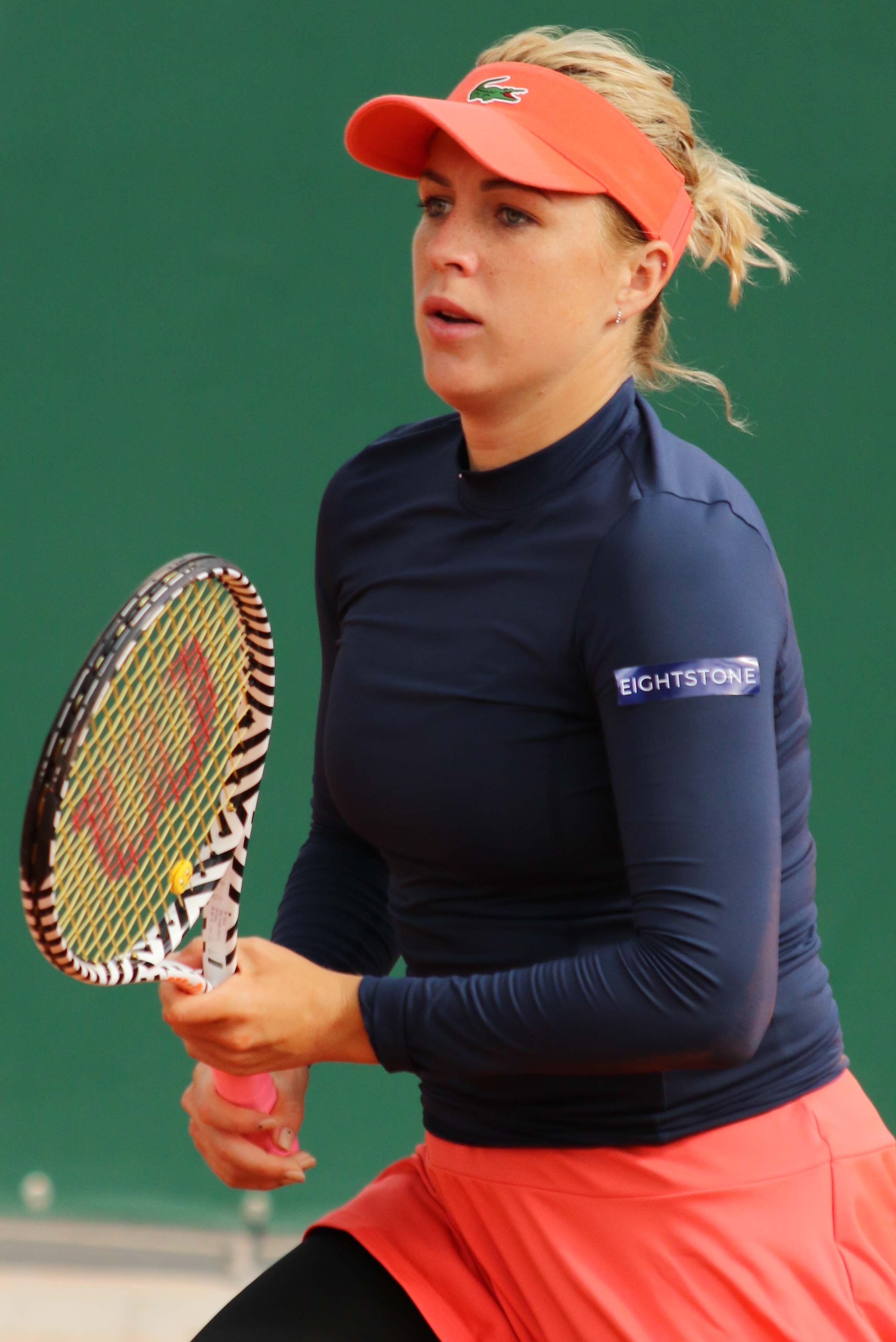 Pavlyuchenkova RG19 (20)